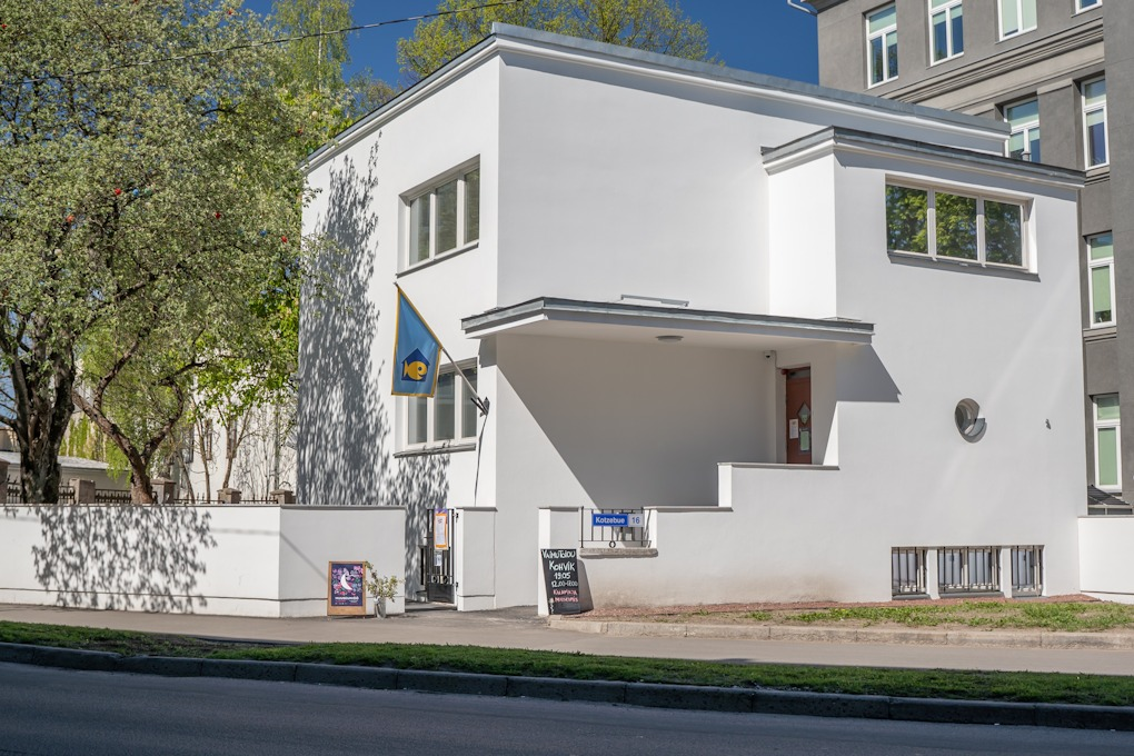 Kalamaja Muuseum